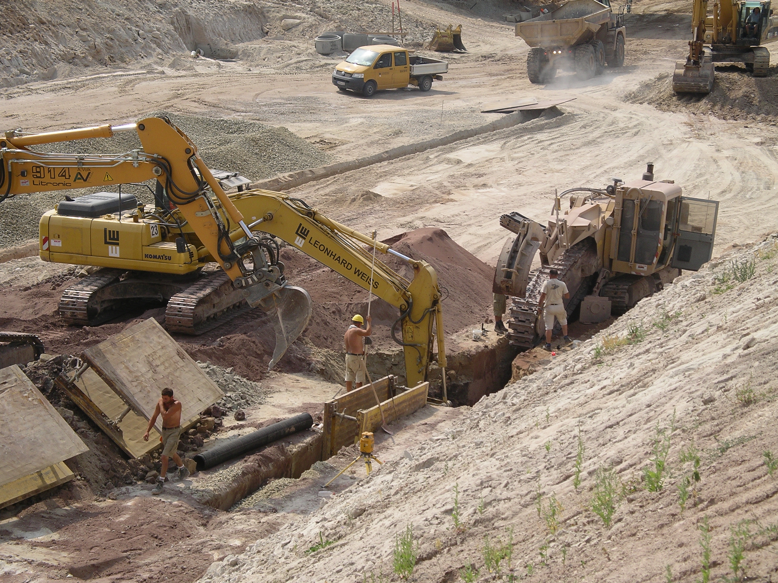 Schachtbauarbeiten für die Entwässerung der Bundesautobahn BAB A73 bei BW57-1, Brücke Zeickhorn, Landkreis Coburg, Germany